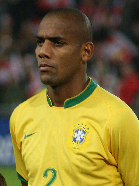 Maicon, St. Jakob Stadion, Basel (Switzerland), Switzerland - Brasil 1:2